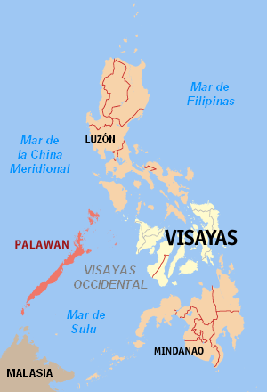 Mapa de Filipinas que muestra la localización de la provincia isleña de Palawan.